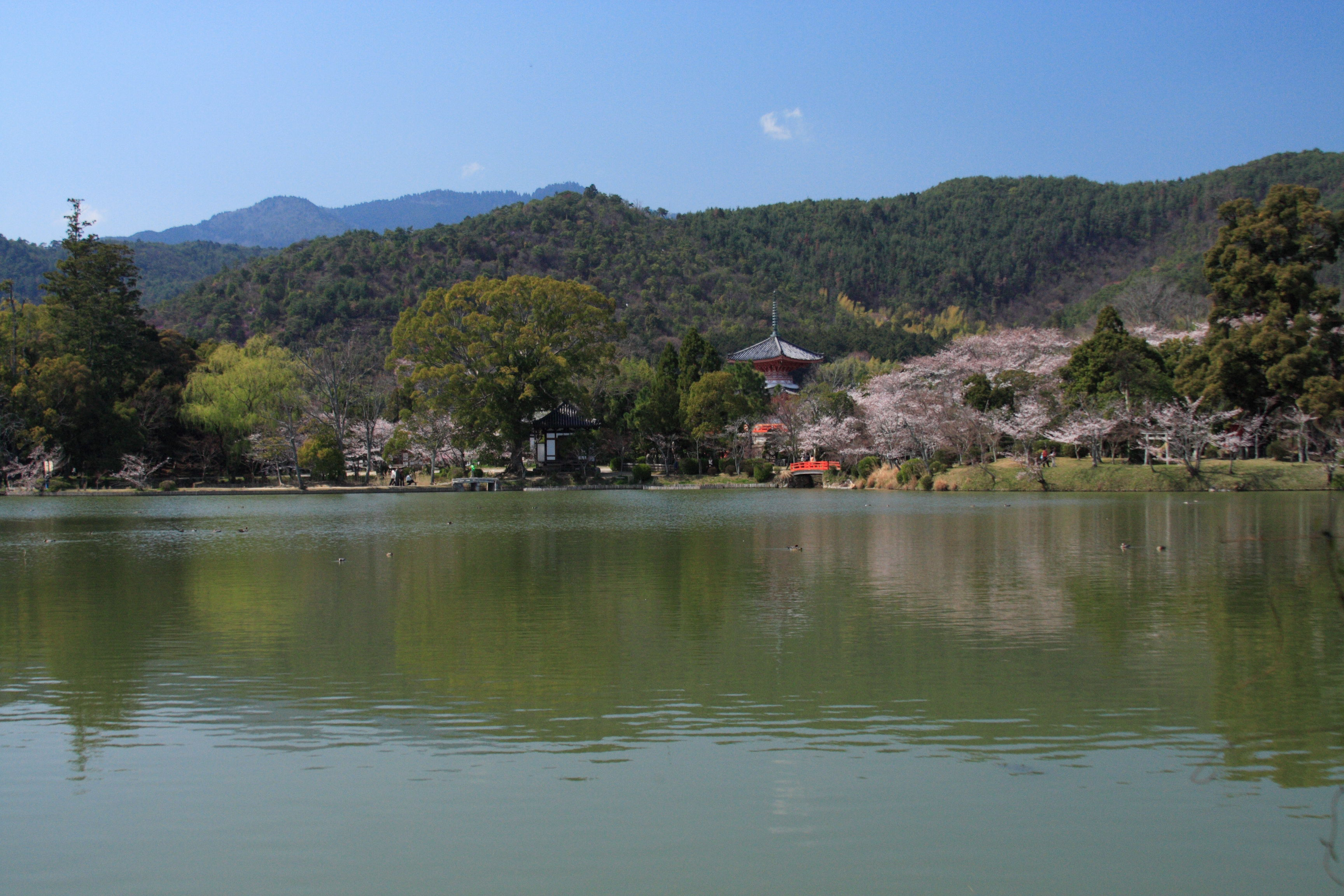 大覚寺 大沢池 京都市/Daikakuji Ōsawa no ike Kyoto,Japan